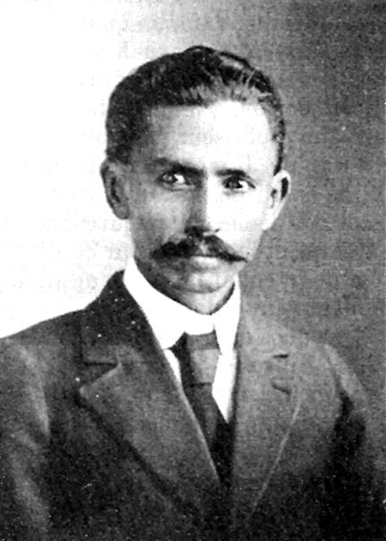 Librado Rivera, profesor y periodista anarquista mexicano (1864-1932).